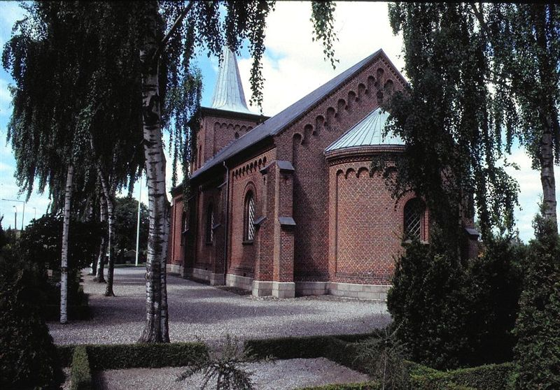 Essenbæk Kirke i Danmark. Essenbæk kirke